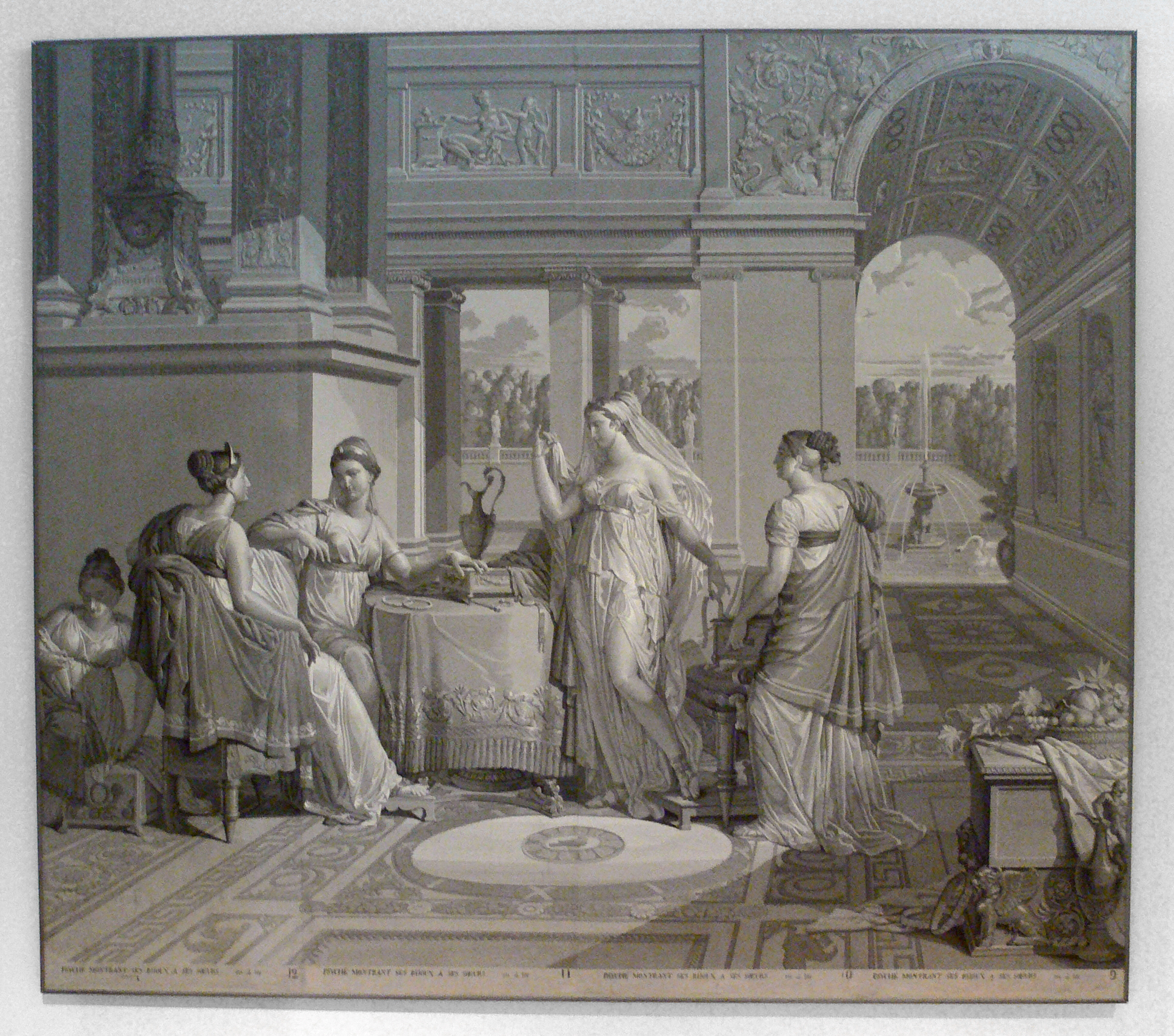 Tapete „Psyche zeigt den Schwestern ihren Schmuck“; Grisailledruck von Holzstöcken auf vier Bahnen Papier Entwurf von Merry-Joseph Blondel und Louis Lafitte; Herstellung: Manufaktur Dufour, Paris 1815/1816 Kunstgewerbemuseum Berlin, Inv. Nr. W-1982,59